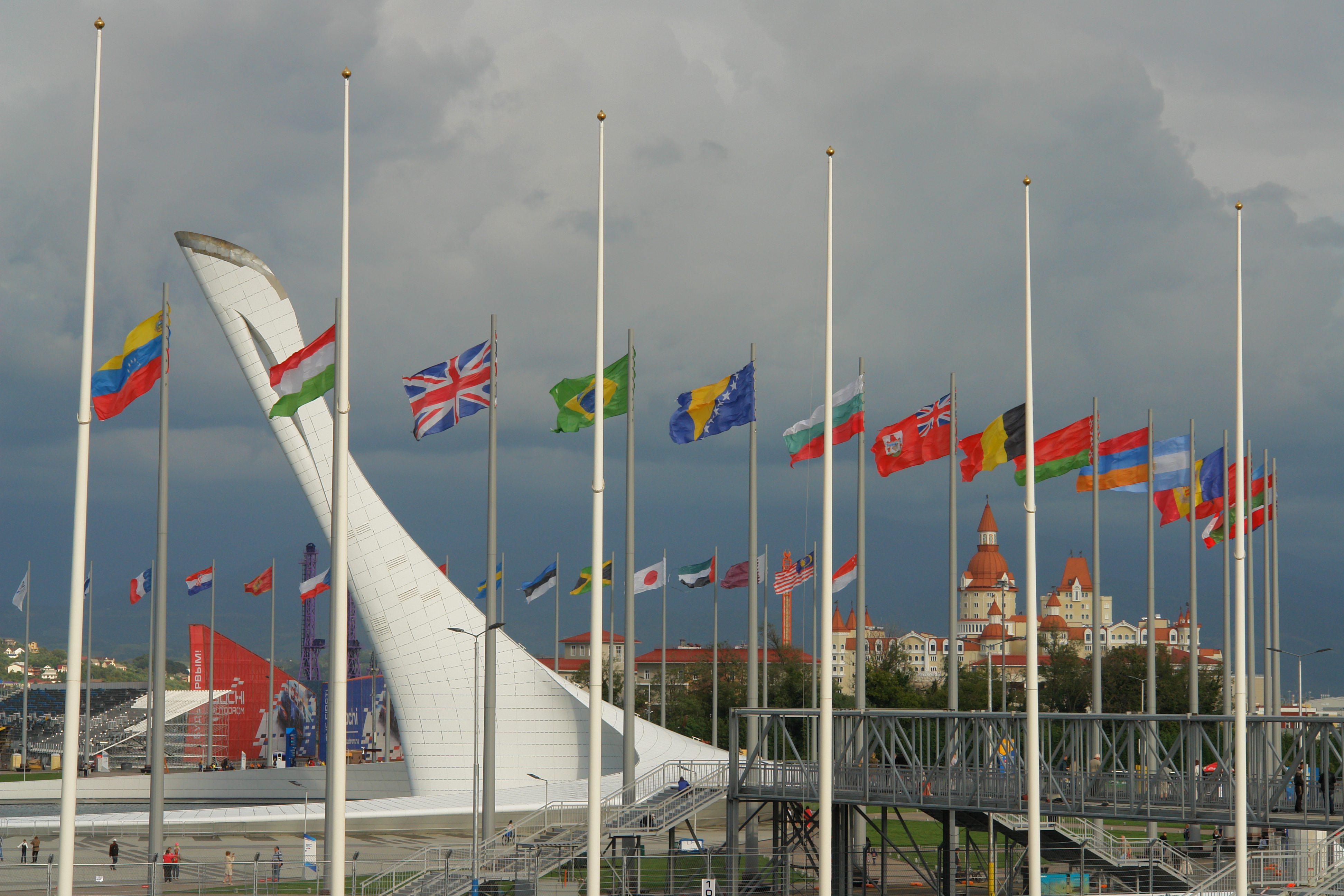 "Завтра первые заезды Fормула1!!!" Гран-при РОССИЯ!